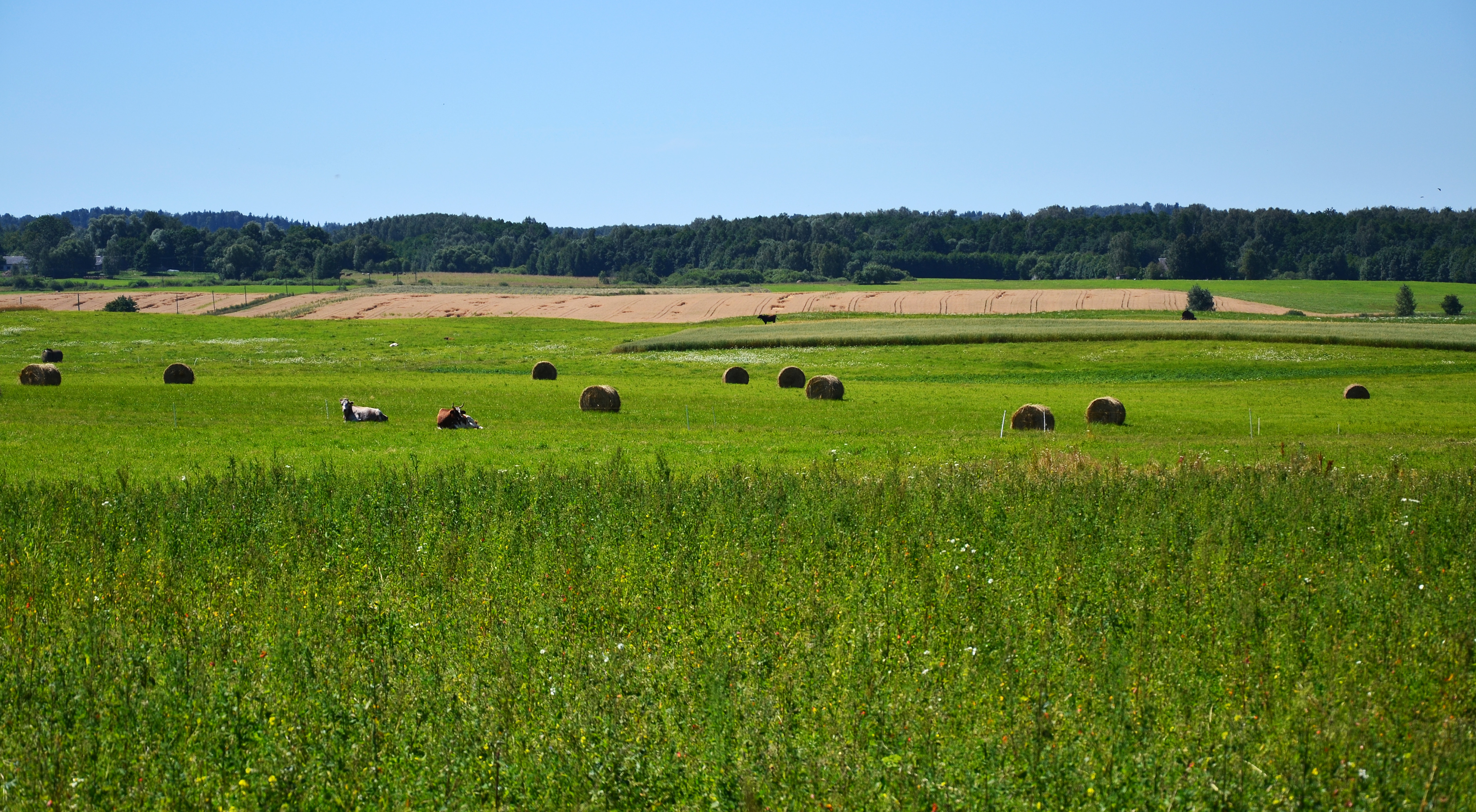 Pilskalne Parish, LV-5447, Latvia